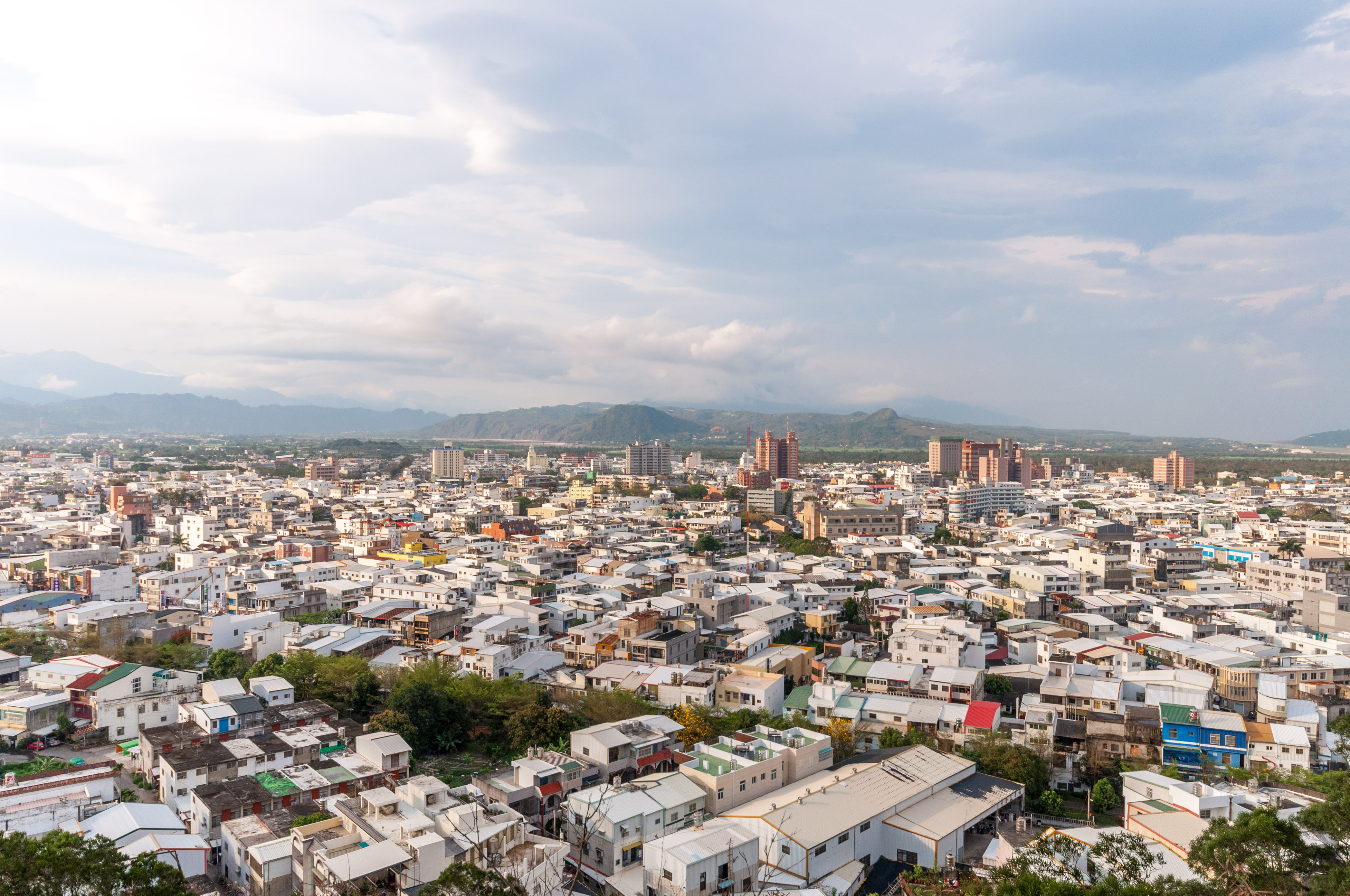 台東鯉魚山俯瞰市區